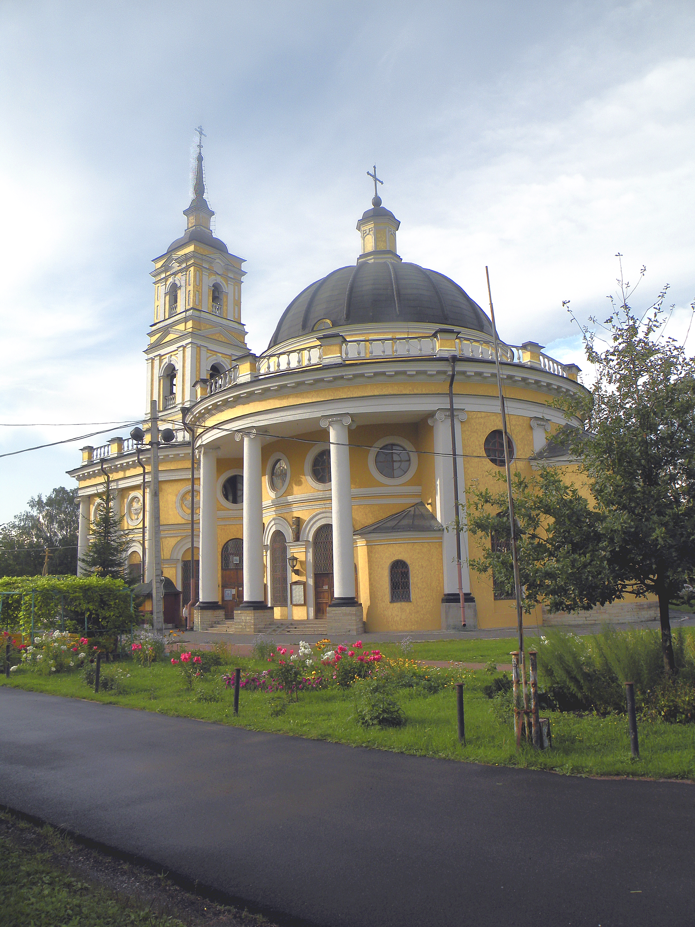 Церковь Пророка Илии на Пороховых. Санкт-Петербург, Россия